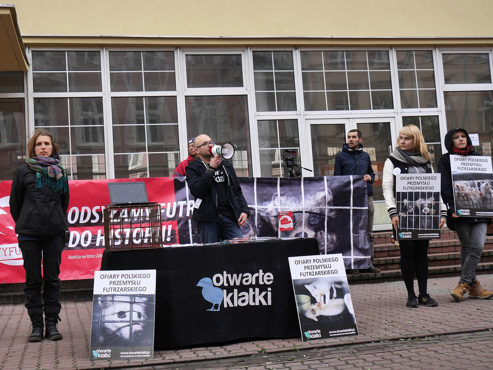 Protest zorganizowany przez stowarzyszenie Otwarte Klatki. Gniezno, ul. Bolesława Chrobrego.